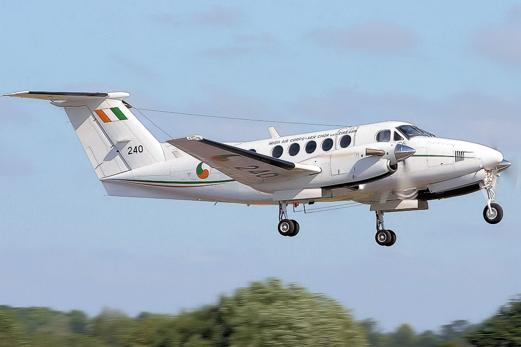 King Air 200 - RIAT 2006